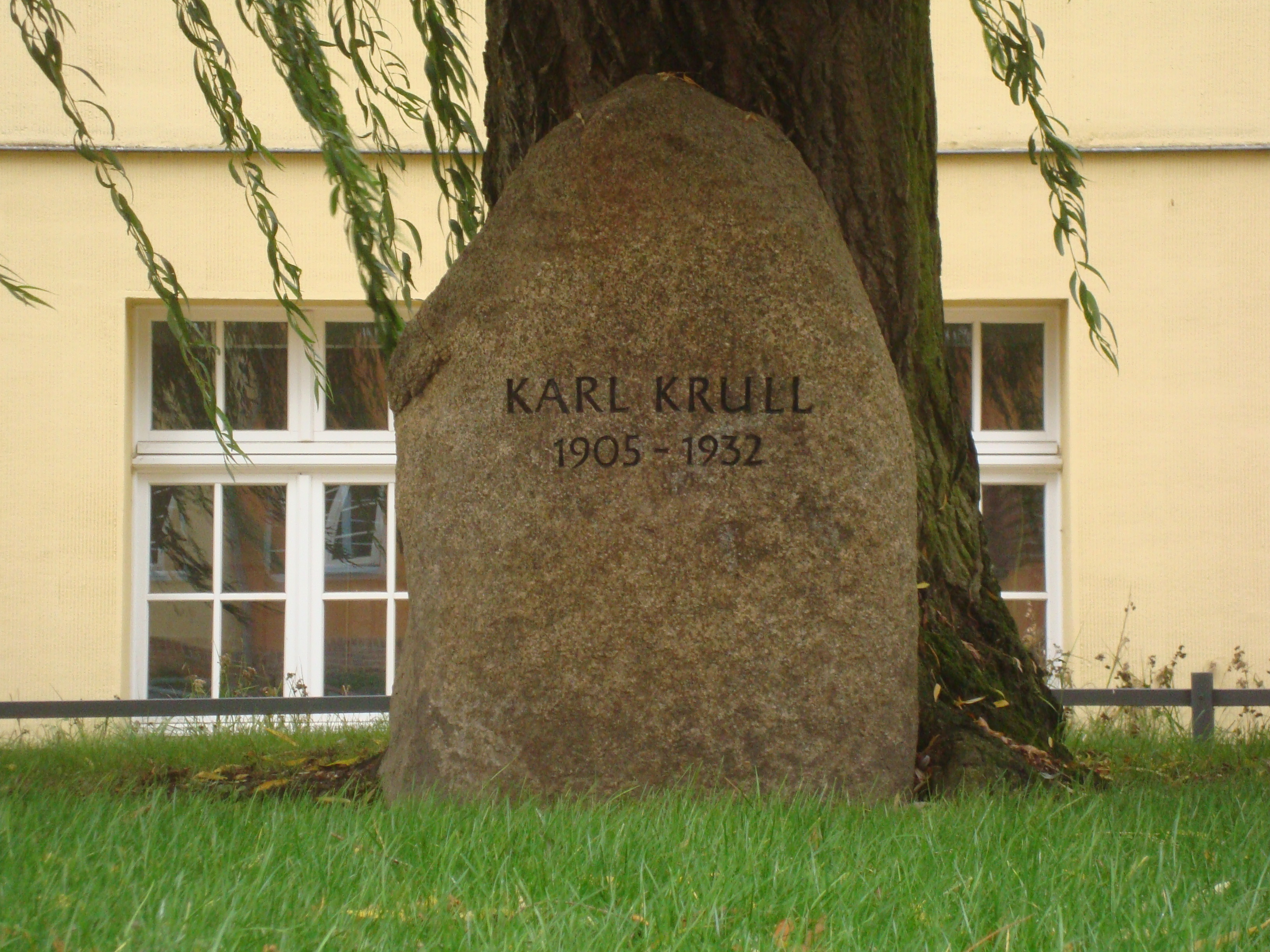 Gedenkstein für Karl Krull vor der Karl-Krull-Schule in der Bleichstraße 36 in Greifswald.